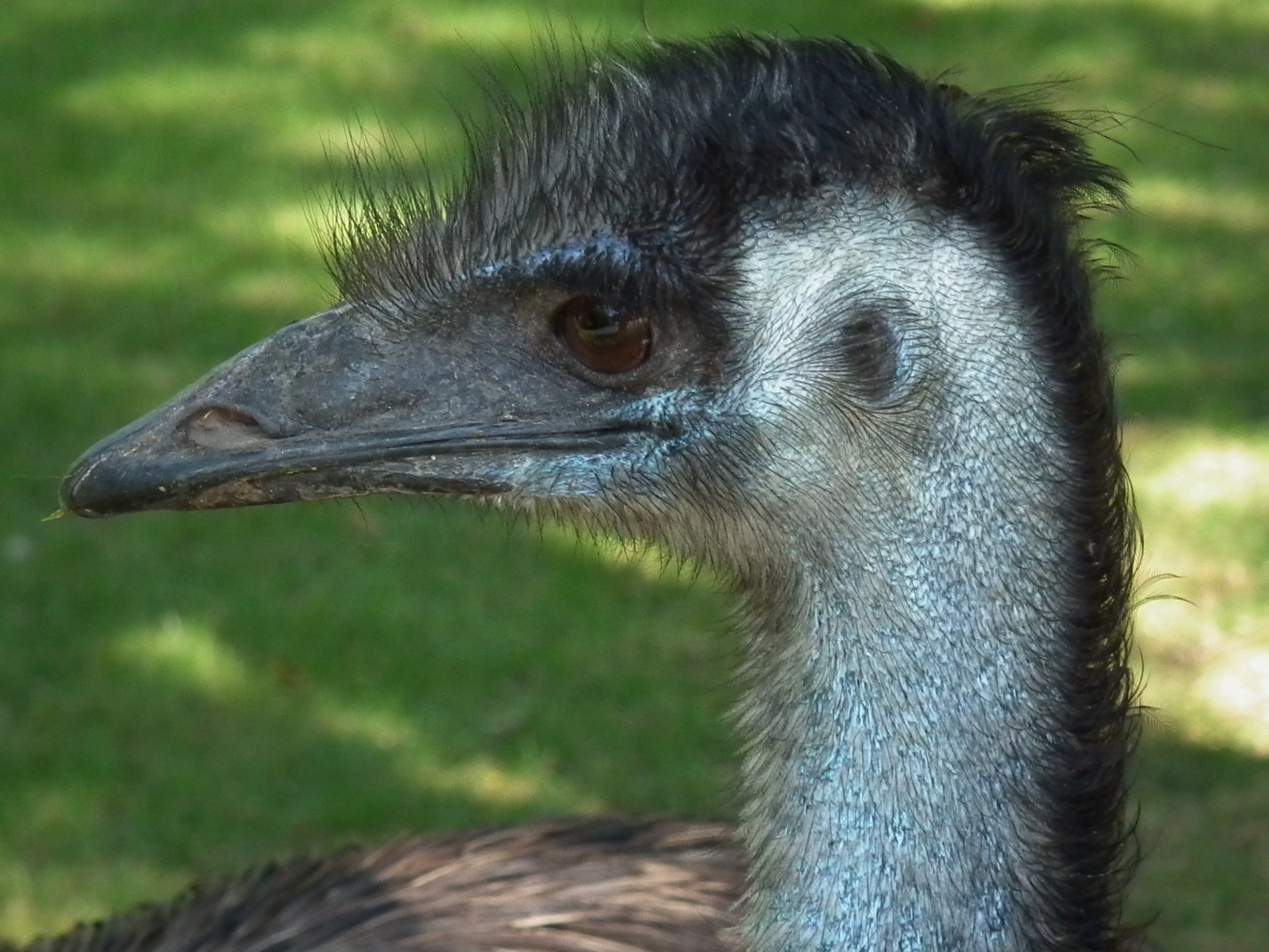 Kopf eines Großen Emu (Dromaius novaehollandiae)